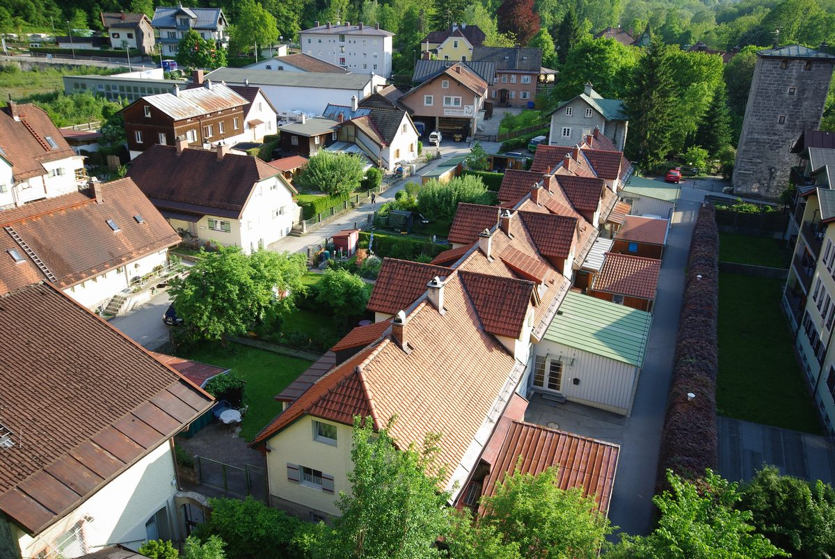 Siedlungsanlage Glück im Winkel, Bad ReichenhallThis is a photograph of an architectural monument.